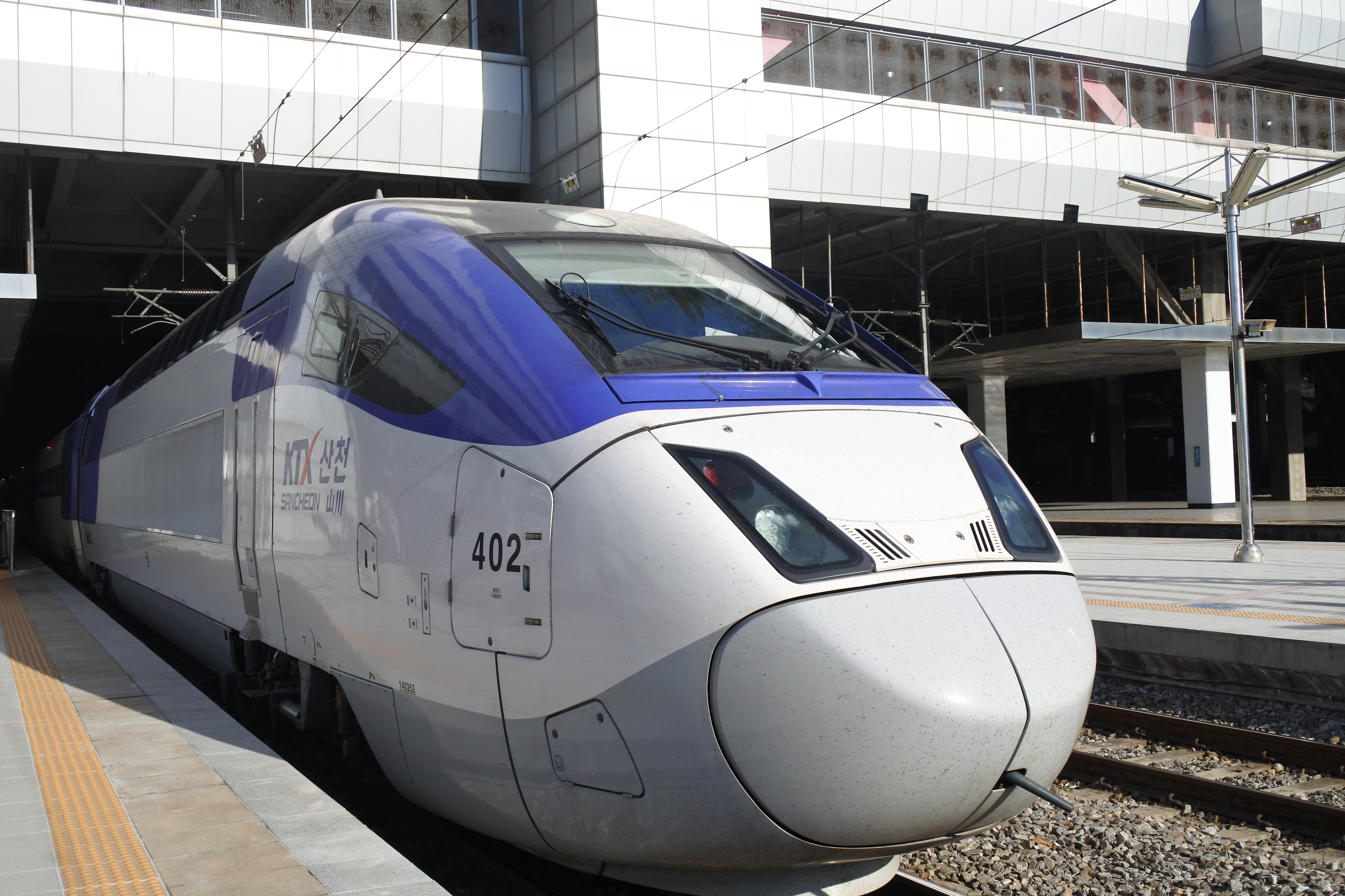 용산역 대기중인 원강선 KTX-402호기 (불펌 금지)